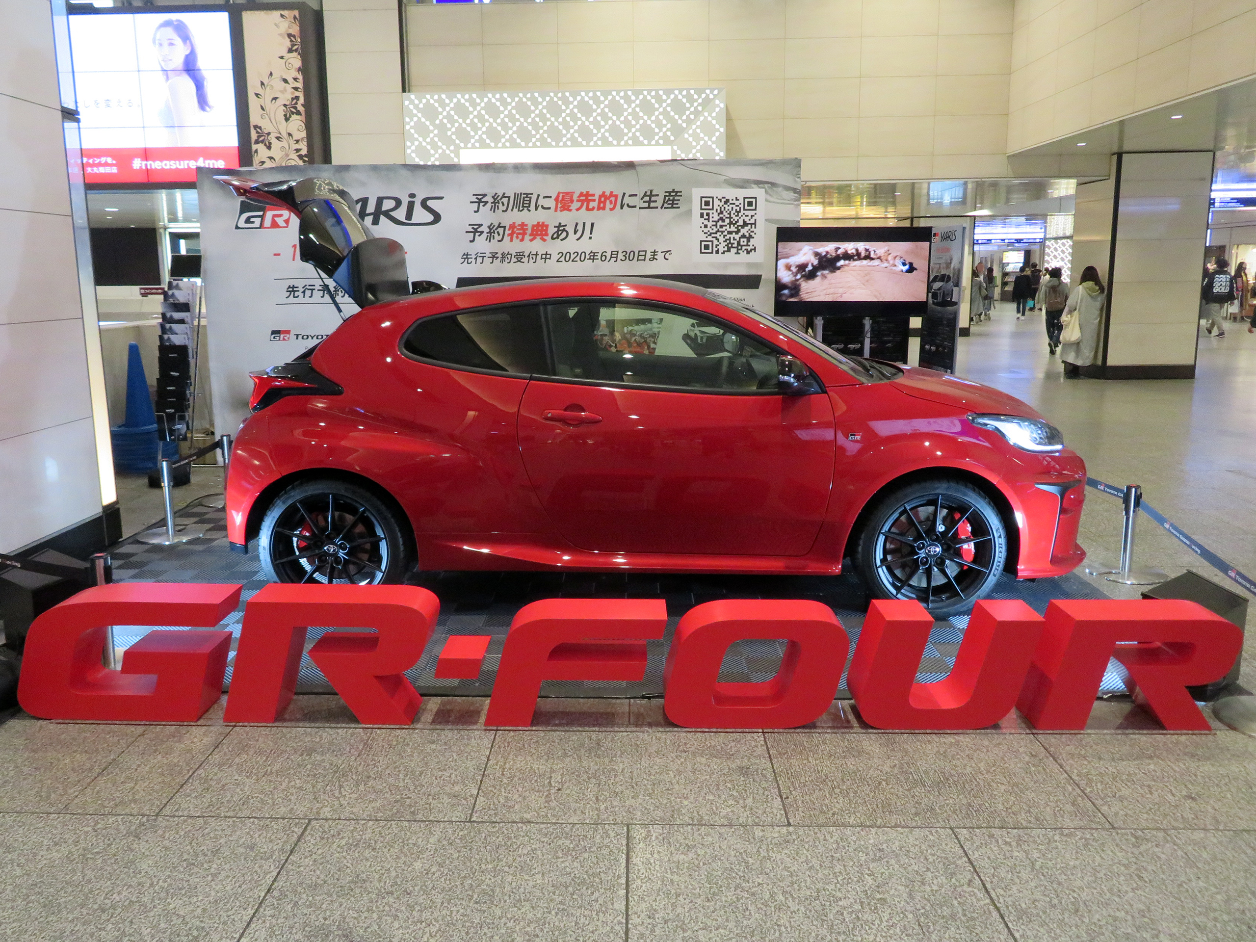 トヨタ・GRヤリスRZ"High-performance・First Edition"を撮影。